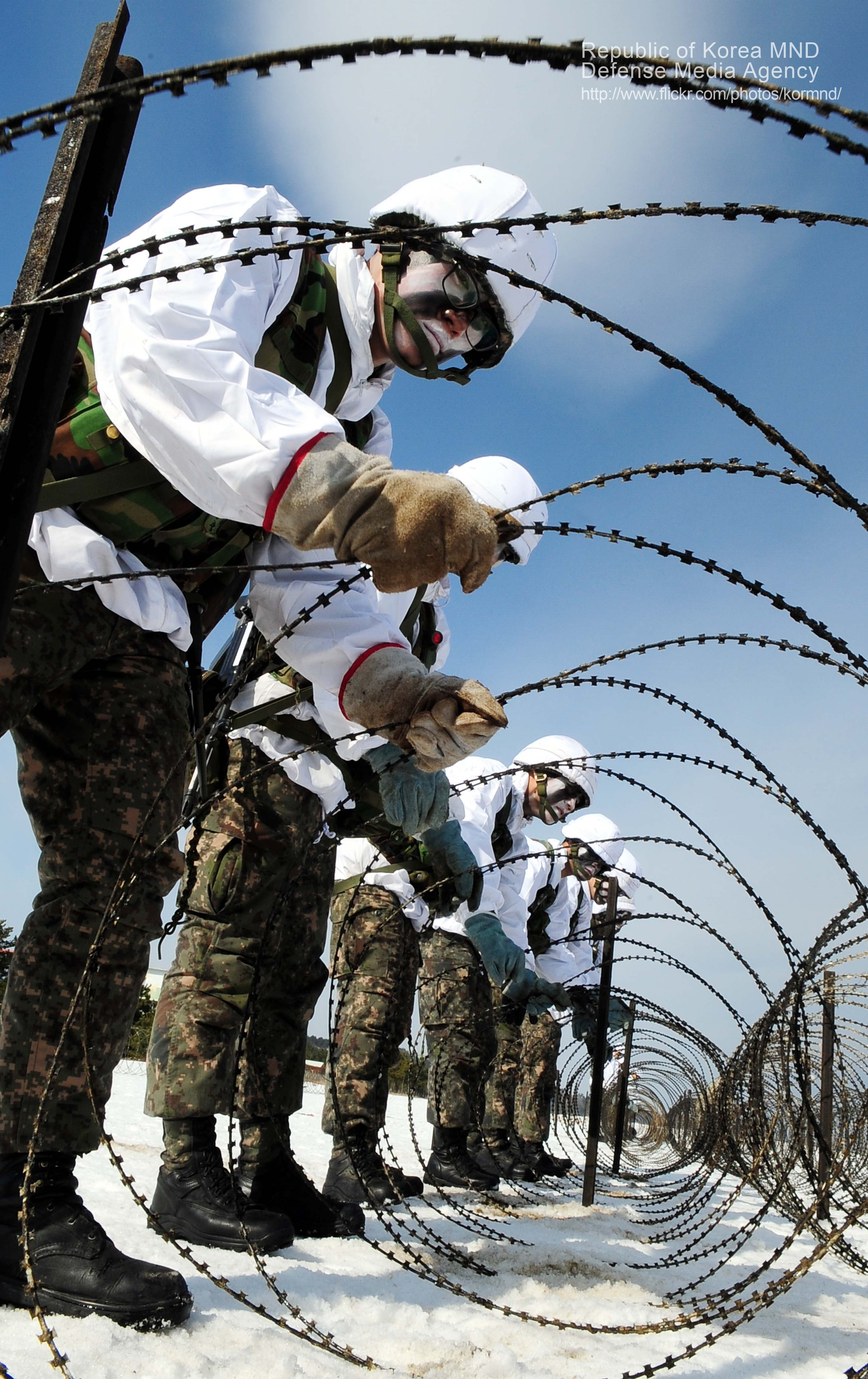 육군23사단 비룡연대 장병들이 28일 시작된 혹한기 훈련에서 침투한 적들의 도주를 차단하기 위해 철조망 장애물을 설치하고 있다. 촬영 - 이헌구 기자